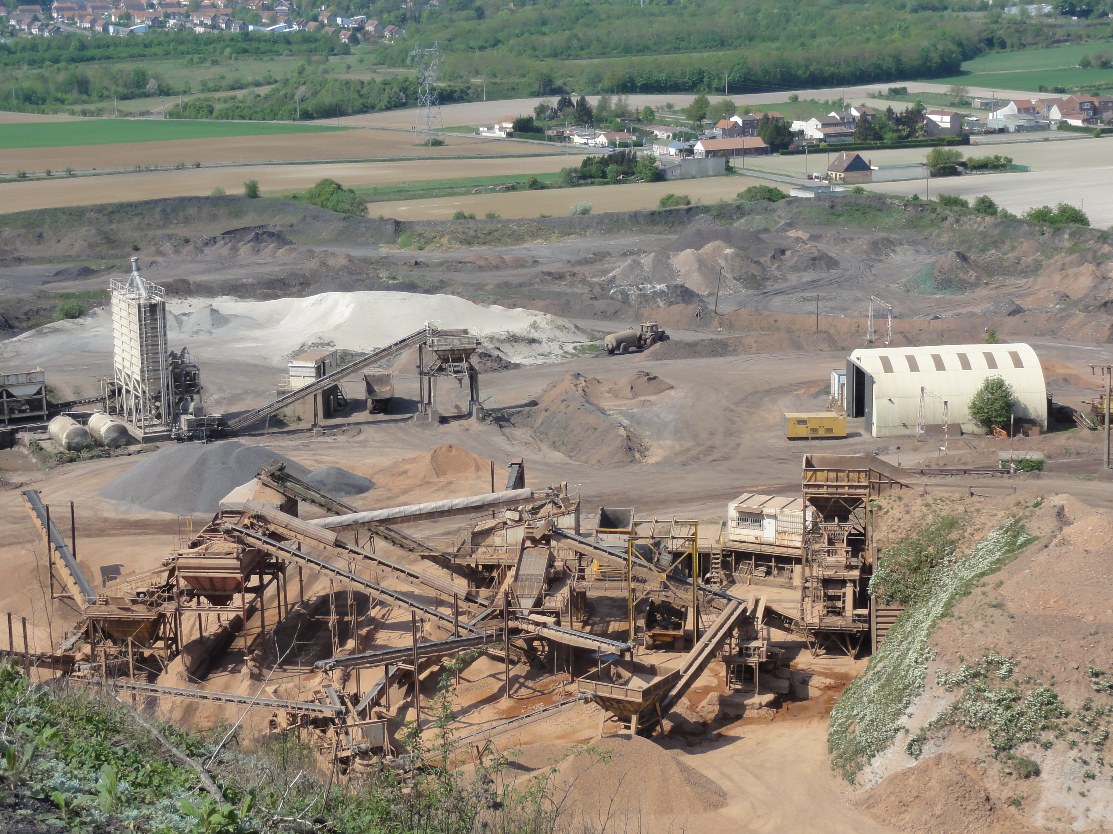 Terril n° 79A dit 16 de Lens Ouest, Fosse n° 16 de la Compagnie des mines de Lens, Loos-en-Gohelle, Pas-de-Calais, Nord-Pas-de-Calais, France.